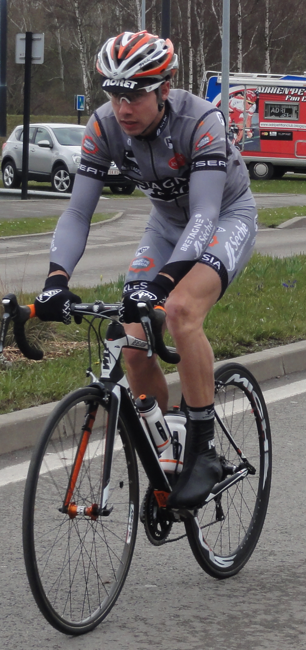 Reportage photographique réalisé le mardi 11 avril 2013 durant l'édition 2013 du Grand Prix de Denain à Denain, Nord, Nord-Pas-de-Calais, France. Depicted person: Benoît Jarrier